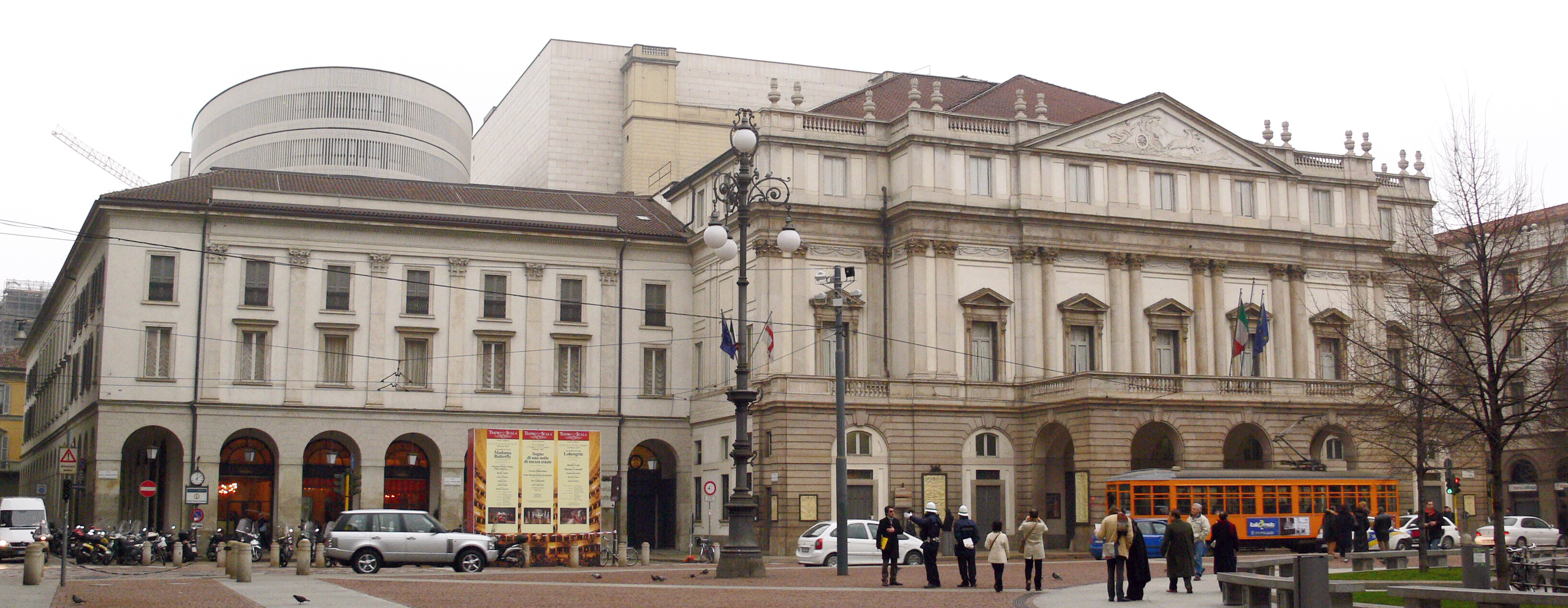 D'Scala zu Mailand Januar 2007